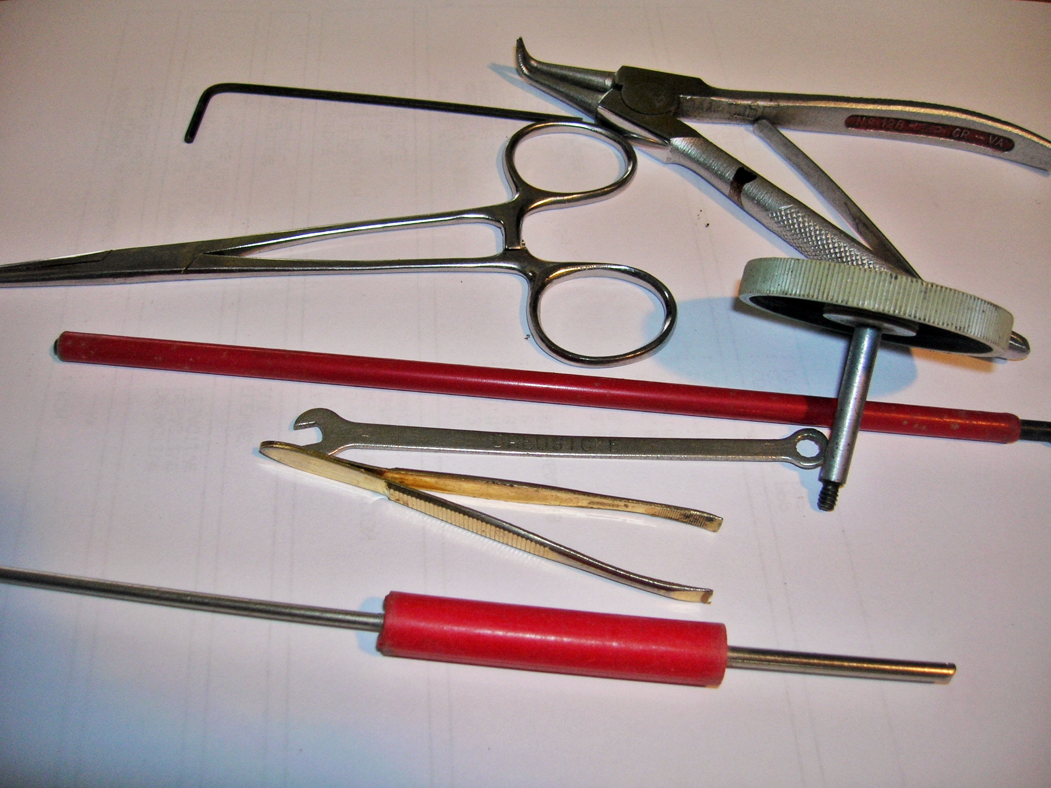 Mécanisme interne IBM 72 à boule: quelques outils pour travailler sur cette machine